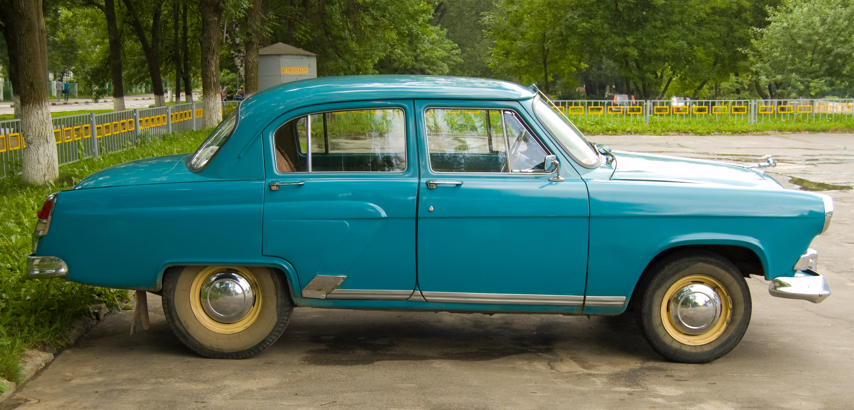 GAZ 21 Volga